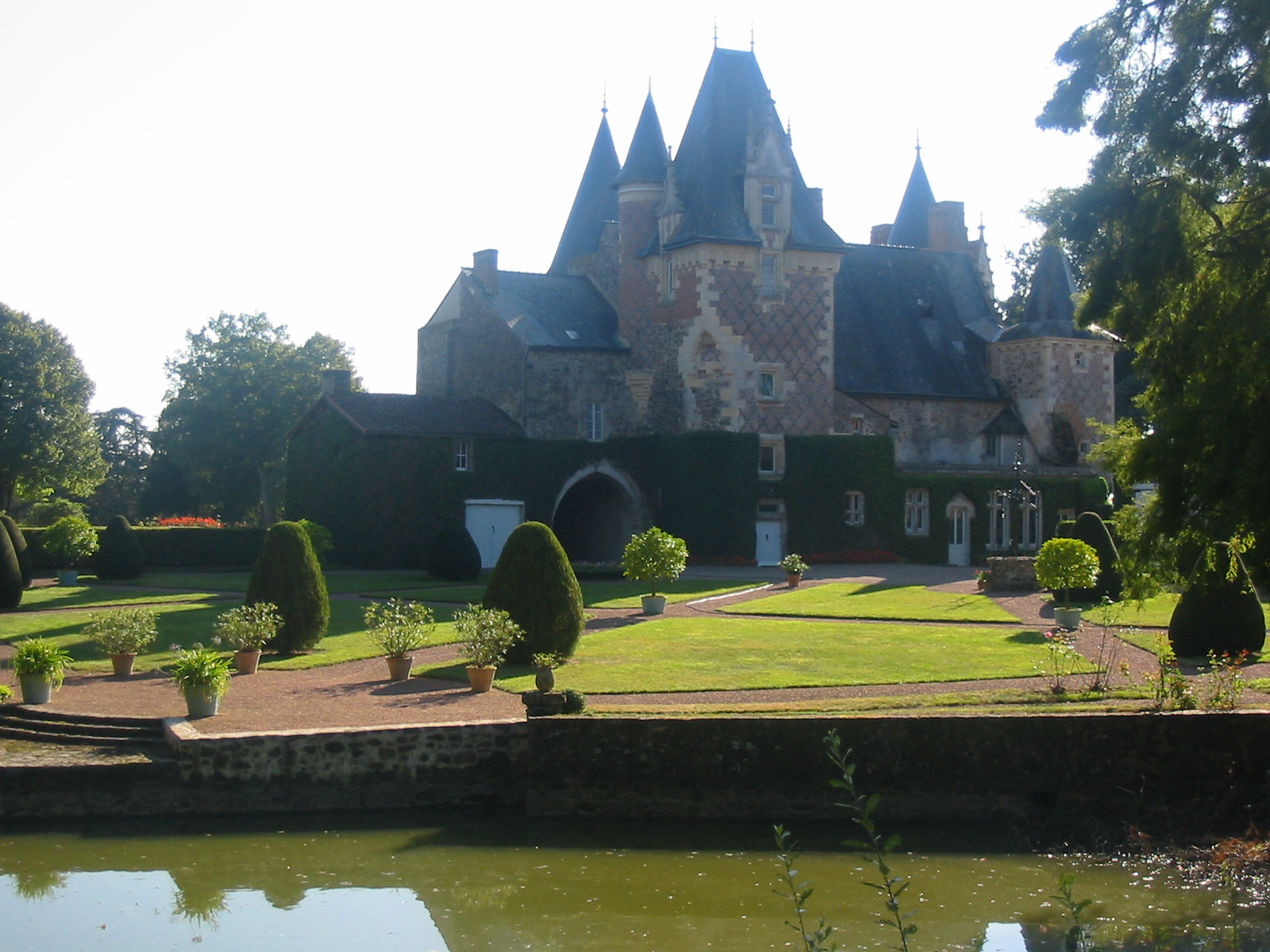 Château du Coudray-Montbault à Vihiers (Maine-et-Loire, France).